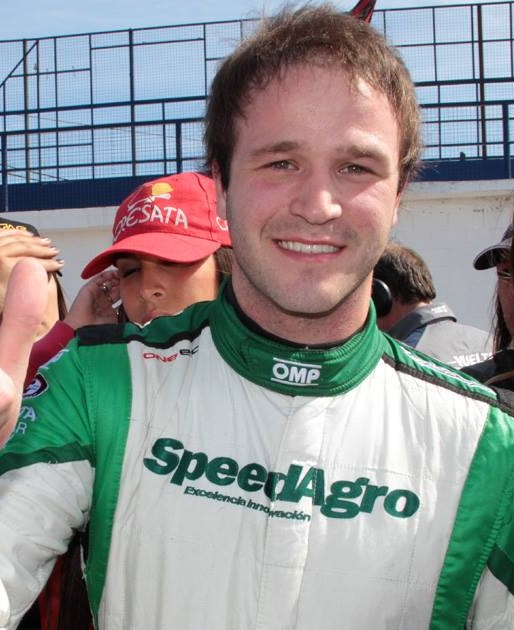 Agustin Canapino, piloto de Turismo Carretera y Top Race V6